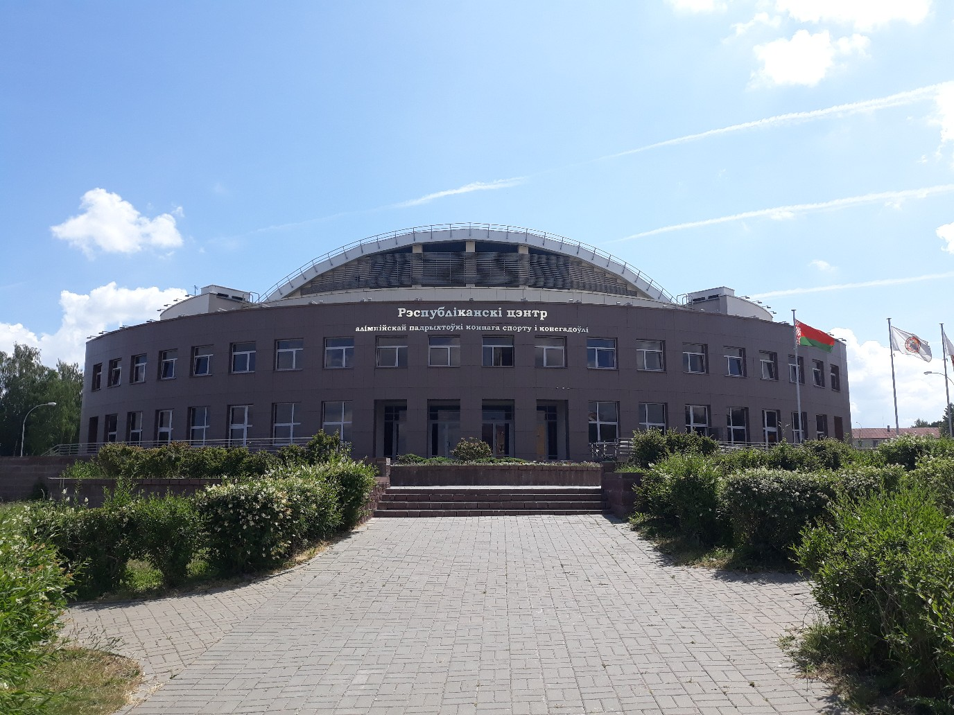 Рэспубліканскі цэнтр алімпійскай падрыхтоўкі коннага спорту і конегадоўлі